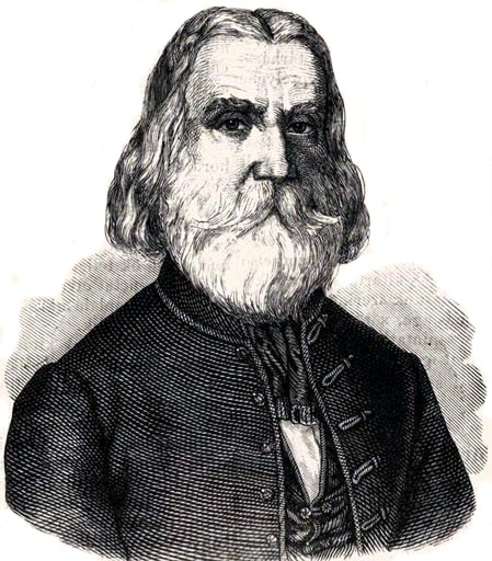 Brassai Sámuel (1800–1897) nyelvész, filozófus, természettudós, a Magyar Tudományos Akadémia rendes tagja portréja